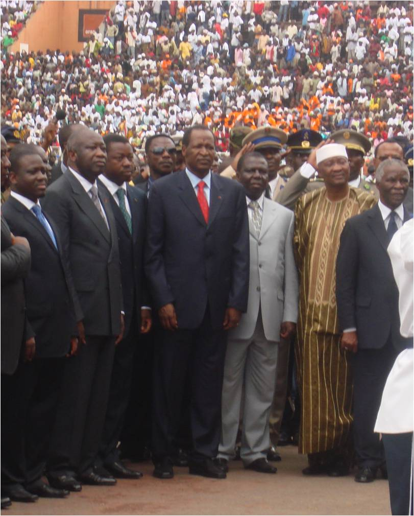 Chefs d'Etats africains à la cérémonie de la flamme de la paix à Bouaké (Côte d'Ivoire) People (L-R): Guillaume Soro, Prime minister of Côte d'Ivoire (blue cravat) Laurent Gbagbo, President of Côte d'Ivoire Faure Gnassingbé, President of Togo Unidentified (sunglasses) Blaise Compaoré, President of Burkina Faso (red cravat) João Bernardo Vieira, President of Guinea-Bissau (grey suite) Amadou Toumani Touré, President of Mali Thabo Mbeki, President of South Africa